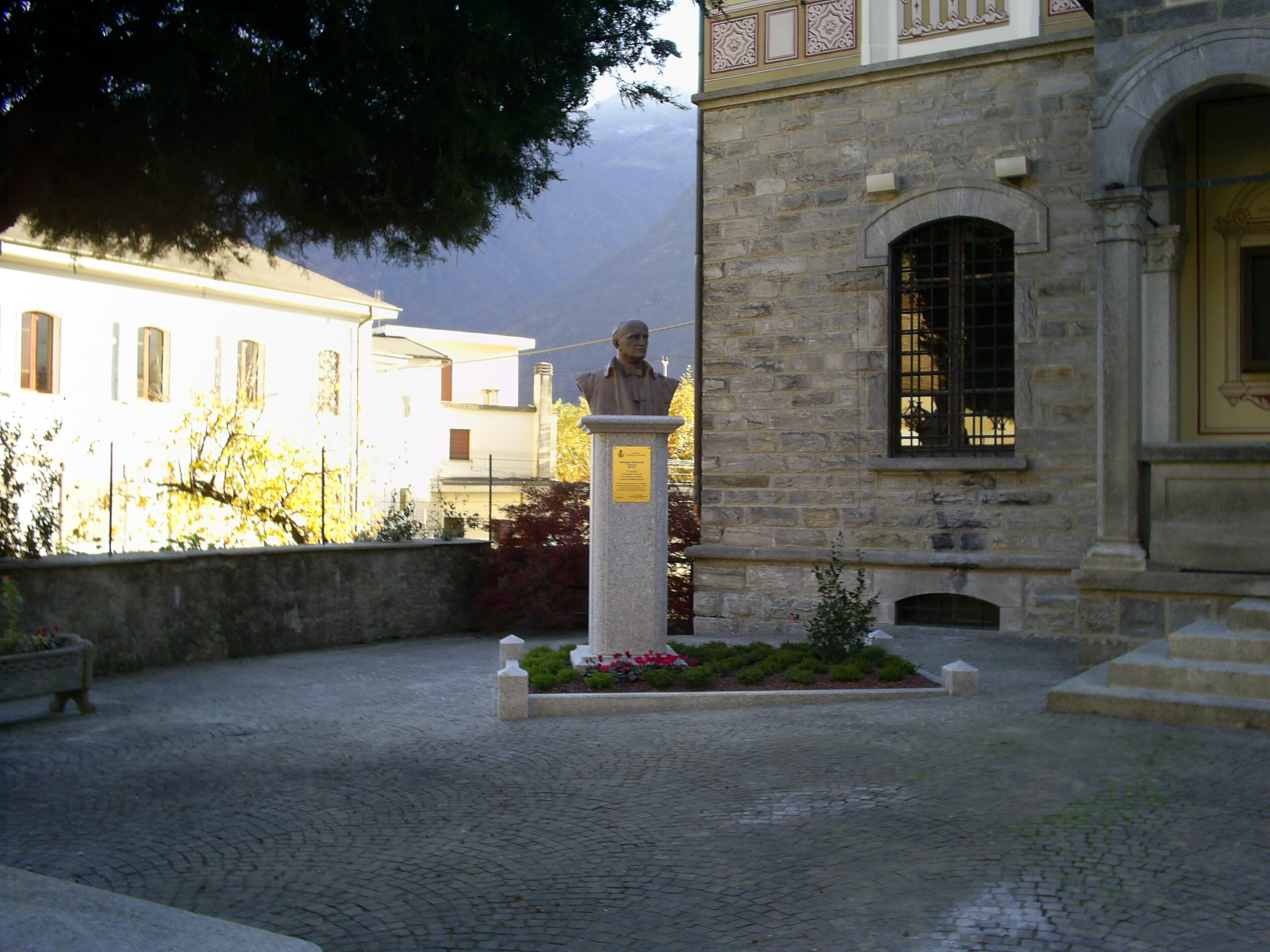 Denkmal Giuseppe Chiovenda